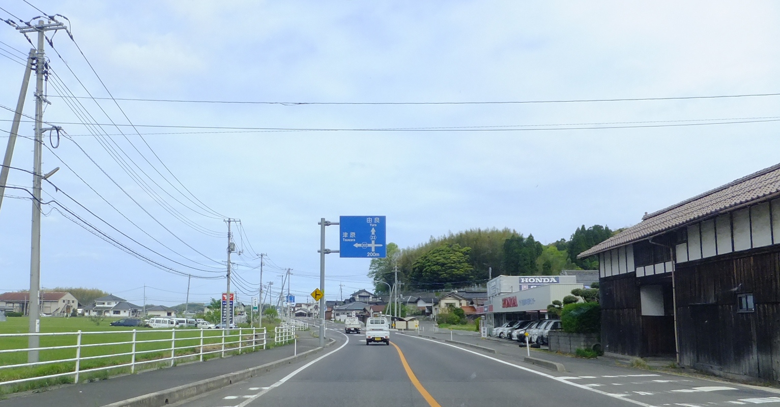 鳥取県倉吉市穴沢 鳥取県道23号倉吉由良線